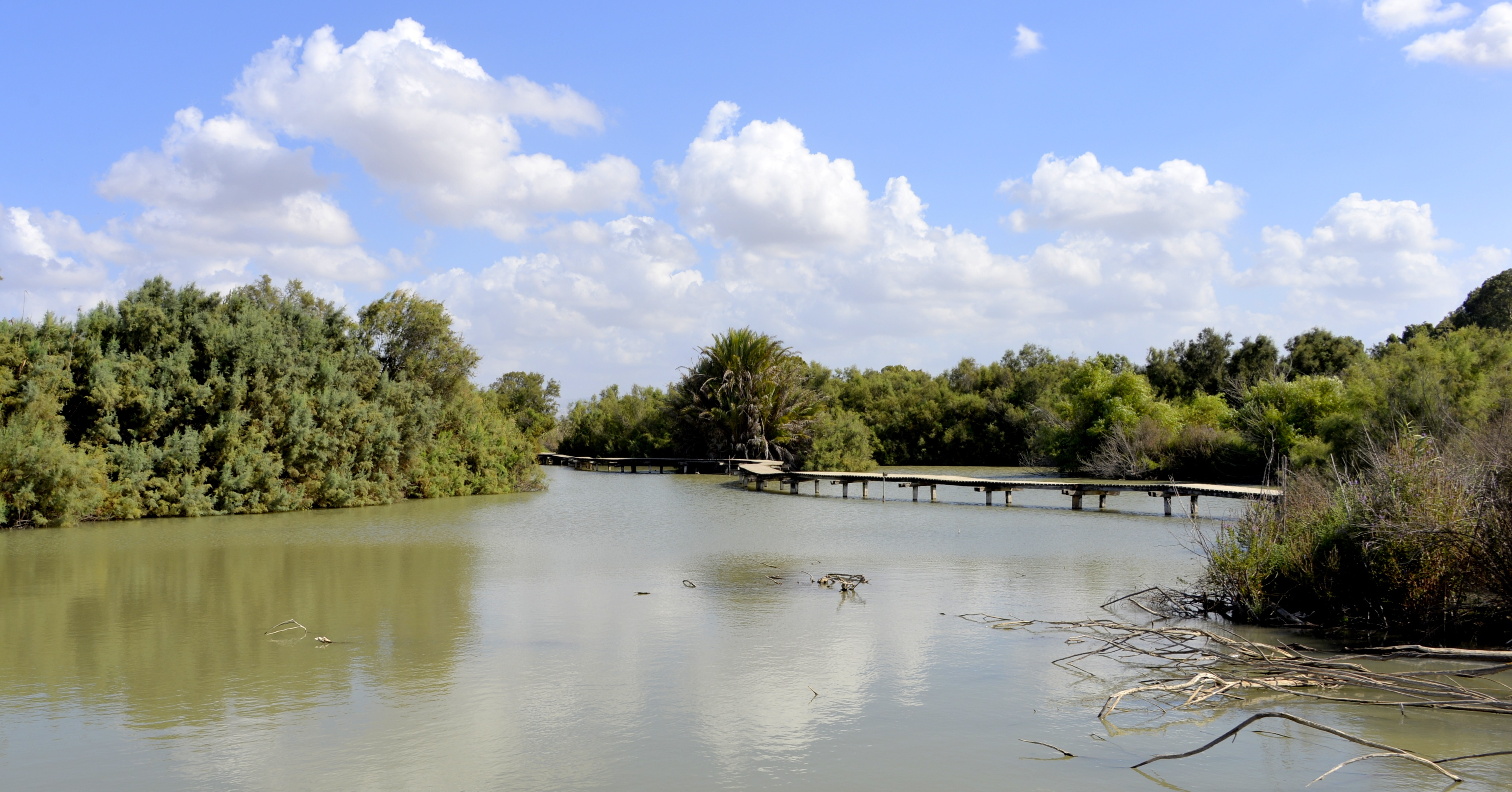 שמורת טבע בעמק זבולון, מזרחית לקריית ביאליק. השמורה כוללת הן את המעיינות והביצות המהווים את מקורו של נחל נעמן והן את האתר הארכאולוגי תל אפק. השמורה הוכרזה ב-1979 והיא משתרעת על פני 660 דונם. ב-1996 הוכרה השמורה כ"אתר רמסר" בהתאם לאמנת רמסר לשימור ולפיתוח בר-קיימא של בתי גידול לחים.